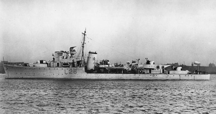 Der Polnische Geleitzerstörer Slazak